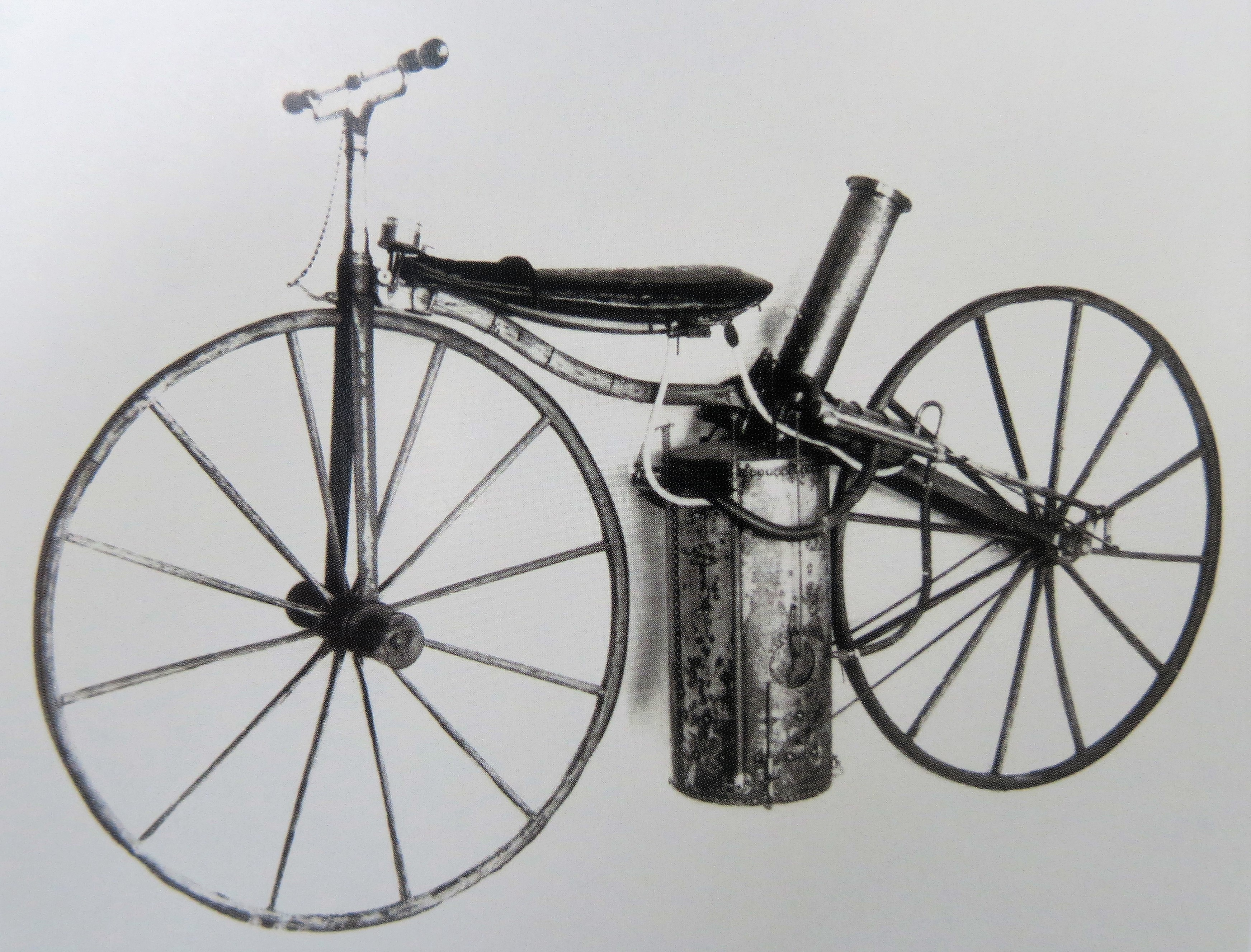 Velocípedo de vapor Roper (1869)